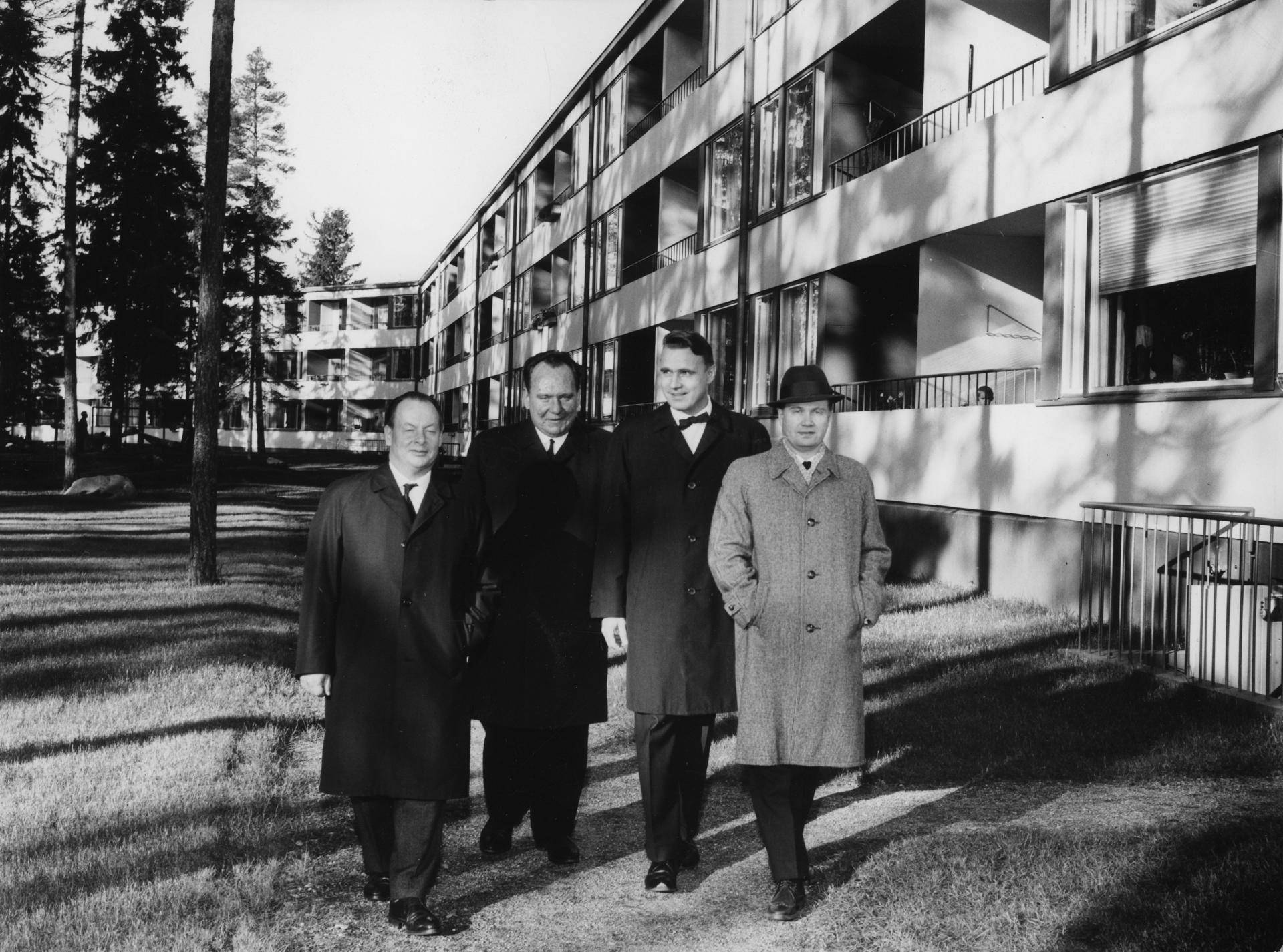 Postisäästöpankin pääjohtaja Teuvo Aura, toimitusjohtaja Armas Puolimatka, Helsingin Työväen Säästöpankin toimitusjohtaja Mauno Koivisto ja Helsingin maalaiskunnan kunnanjohtaja Lauri Lairala nykyisen Vantaan Kaivokselassa, jonka uusi asuinalue oli heidän aikaansaannostaan.